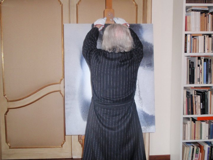 Ritratto del pittore Vasco Bendini